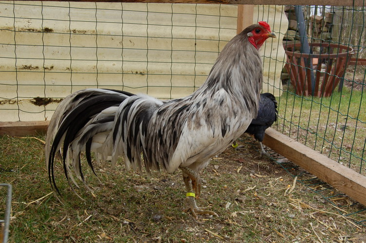 Foto Wanda Zwart